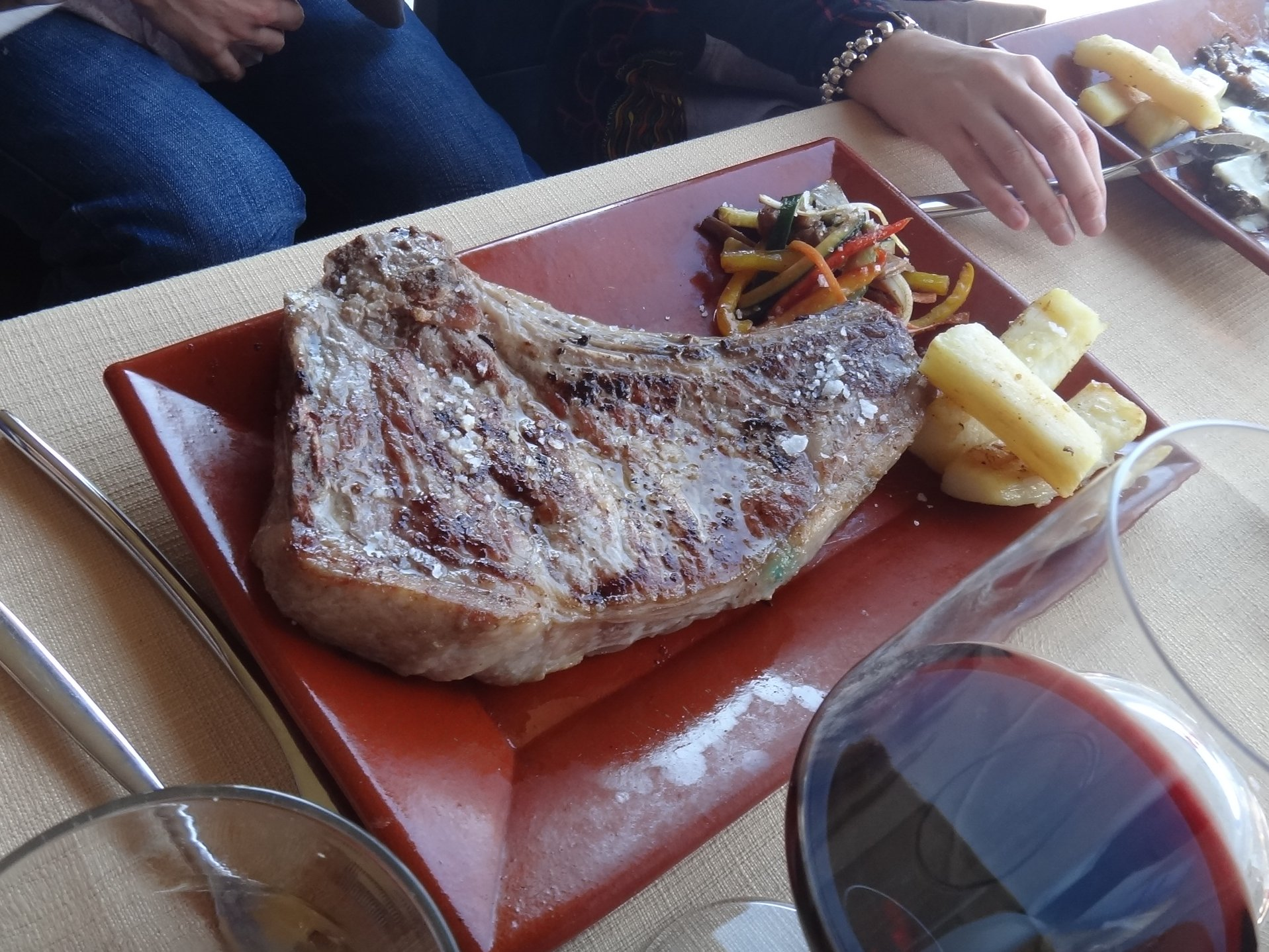 Carne retinta